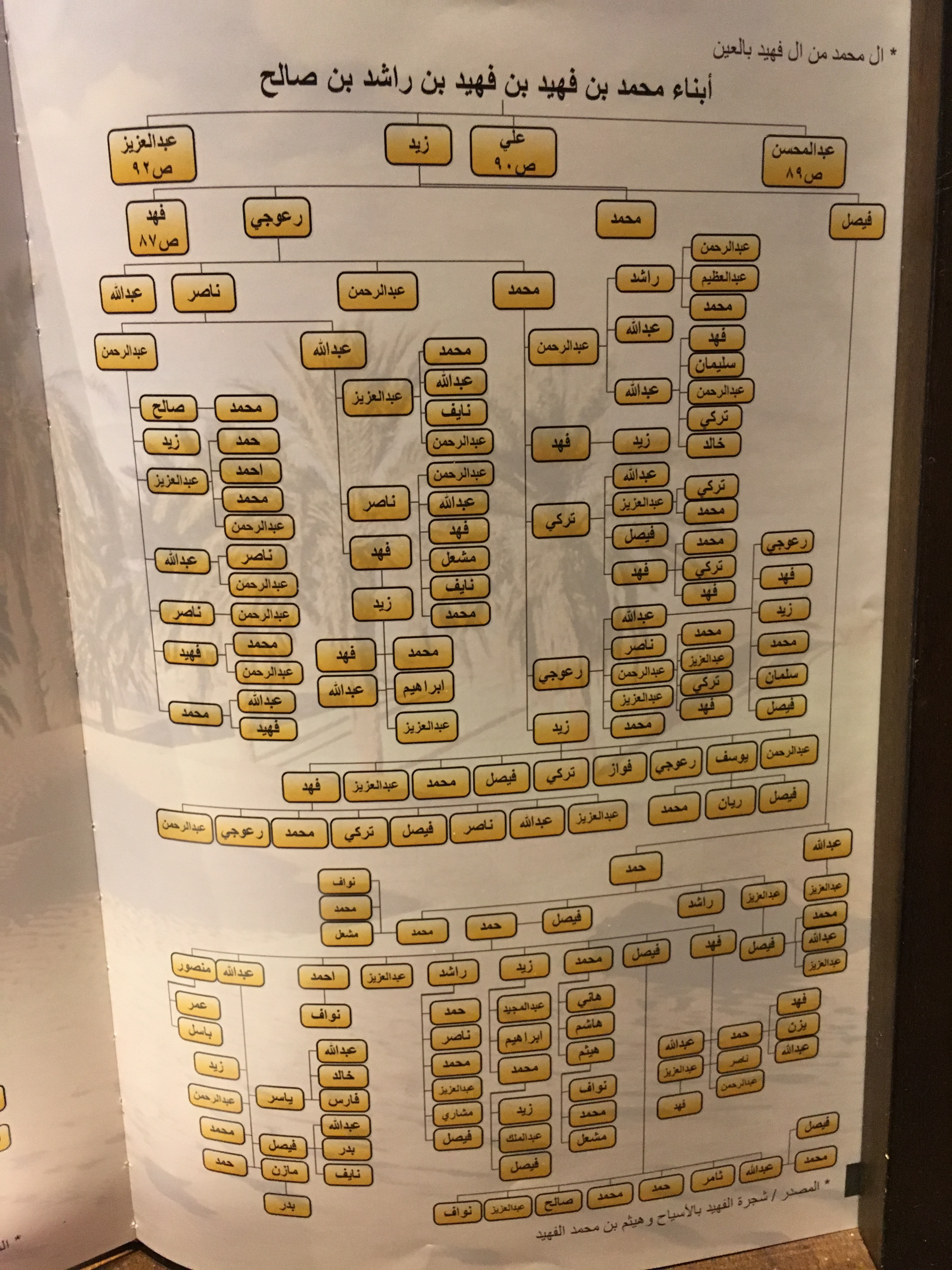 ابناء الامير " محمد بن فهيد بن فهيد بن راشد بن صالح آل راشد الأسعدي العتيبي "